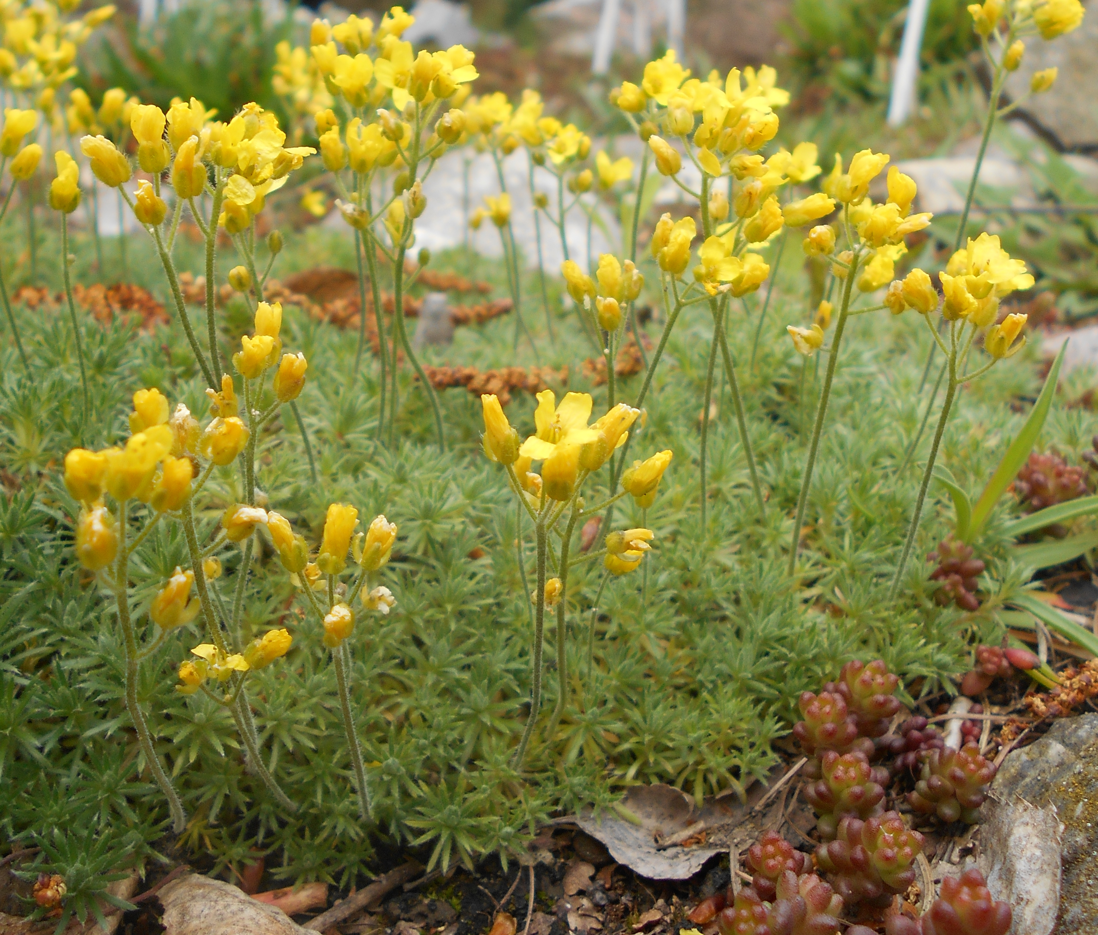 Głodek wełnistoowockowy (Draba lasiocarpa), Ogród Botaniczny UMCS w Lublinie.